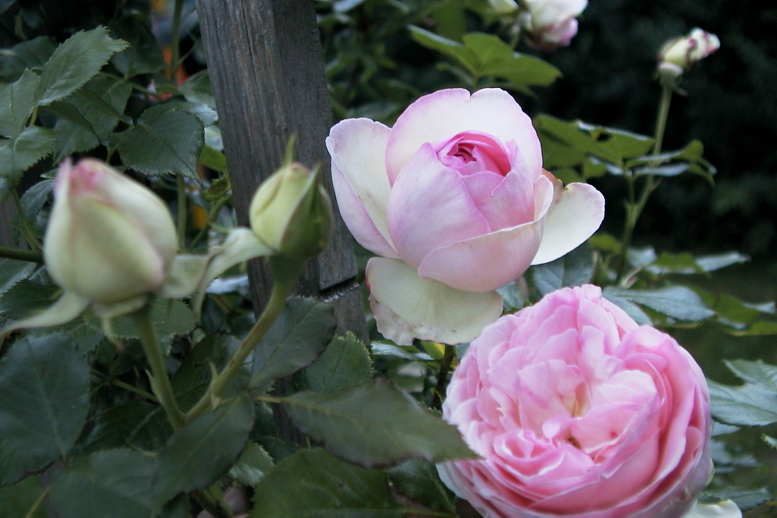 Rosa 'Meiviolin' (syn.: 'Eden Climber', 'Eden Rose 85', 'Eden Rose 88', 'Pierre de Ronsard') Meilland 1987